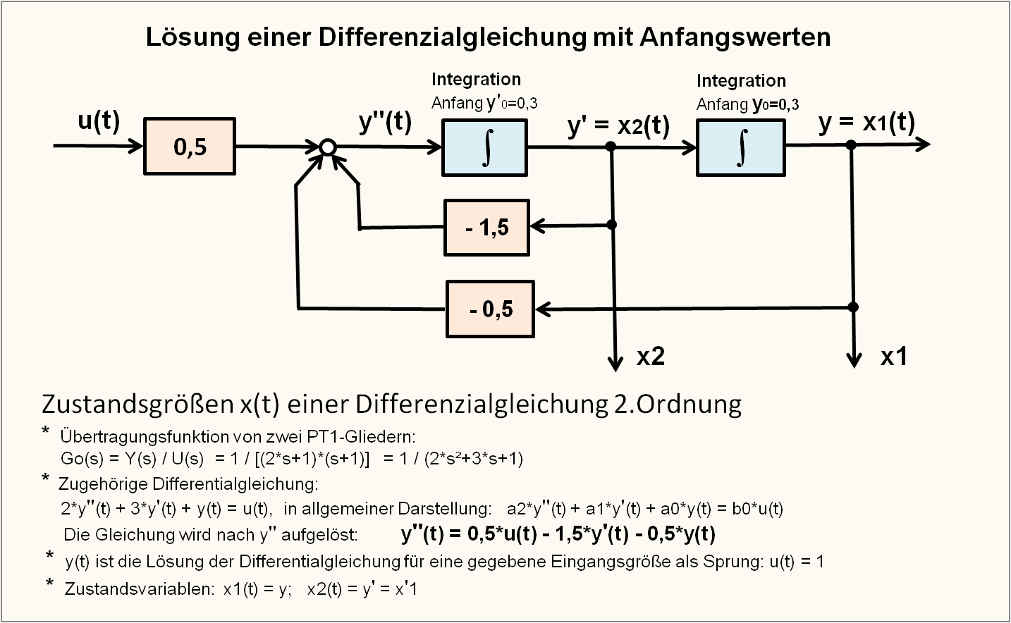 Signalflussplan zur Lösung einer gewöhnlichen Differenzialgleichung mit Anfangswerten.